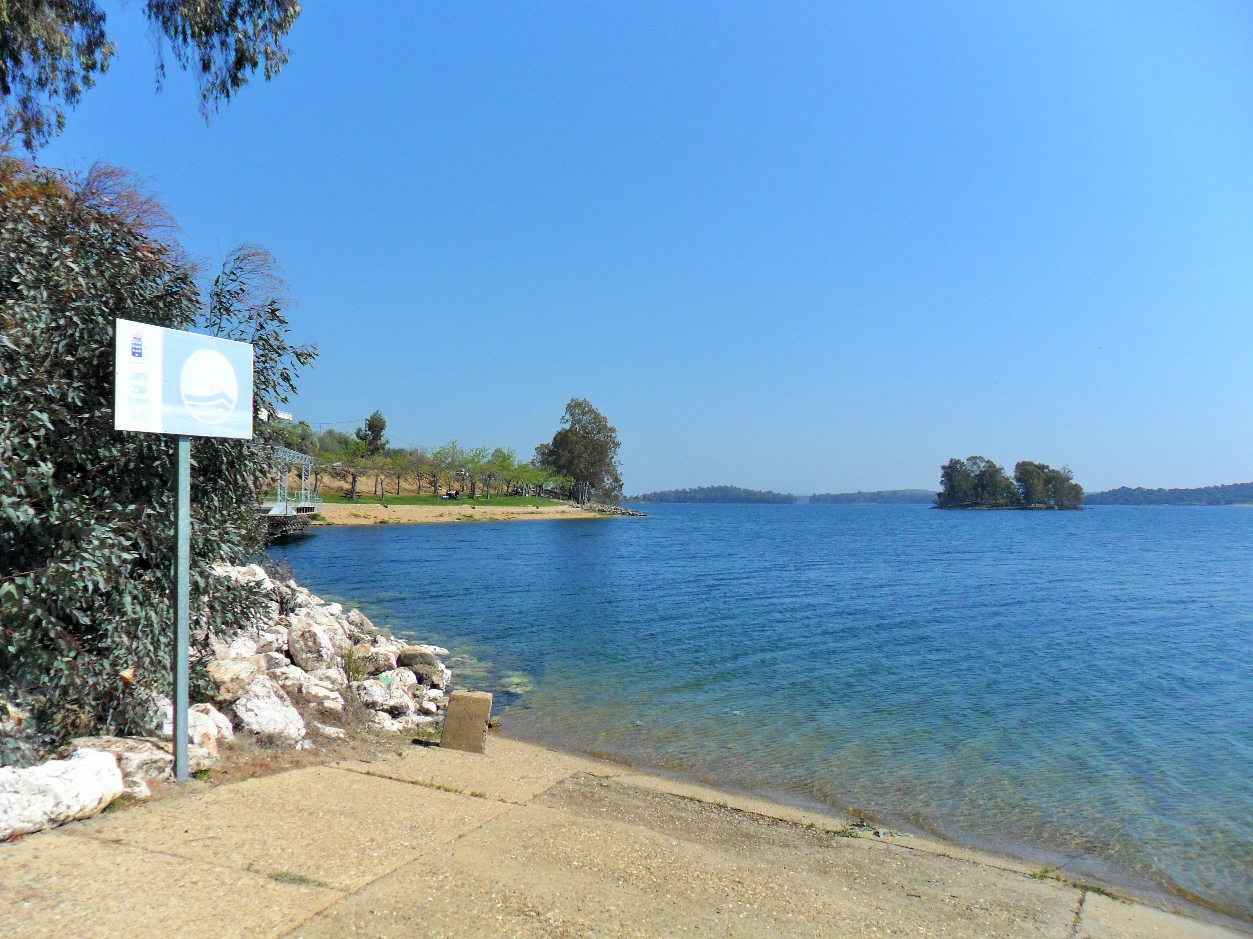 Embarcadero de la playa en el embalse de Orellana, en único en España con Bandera Azul en aguan interiores